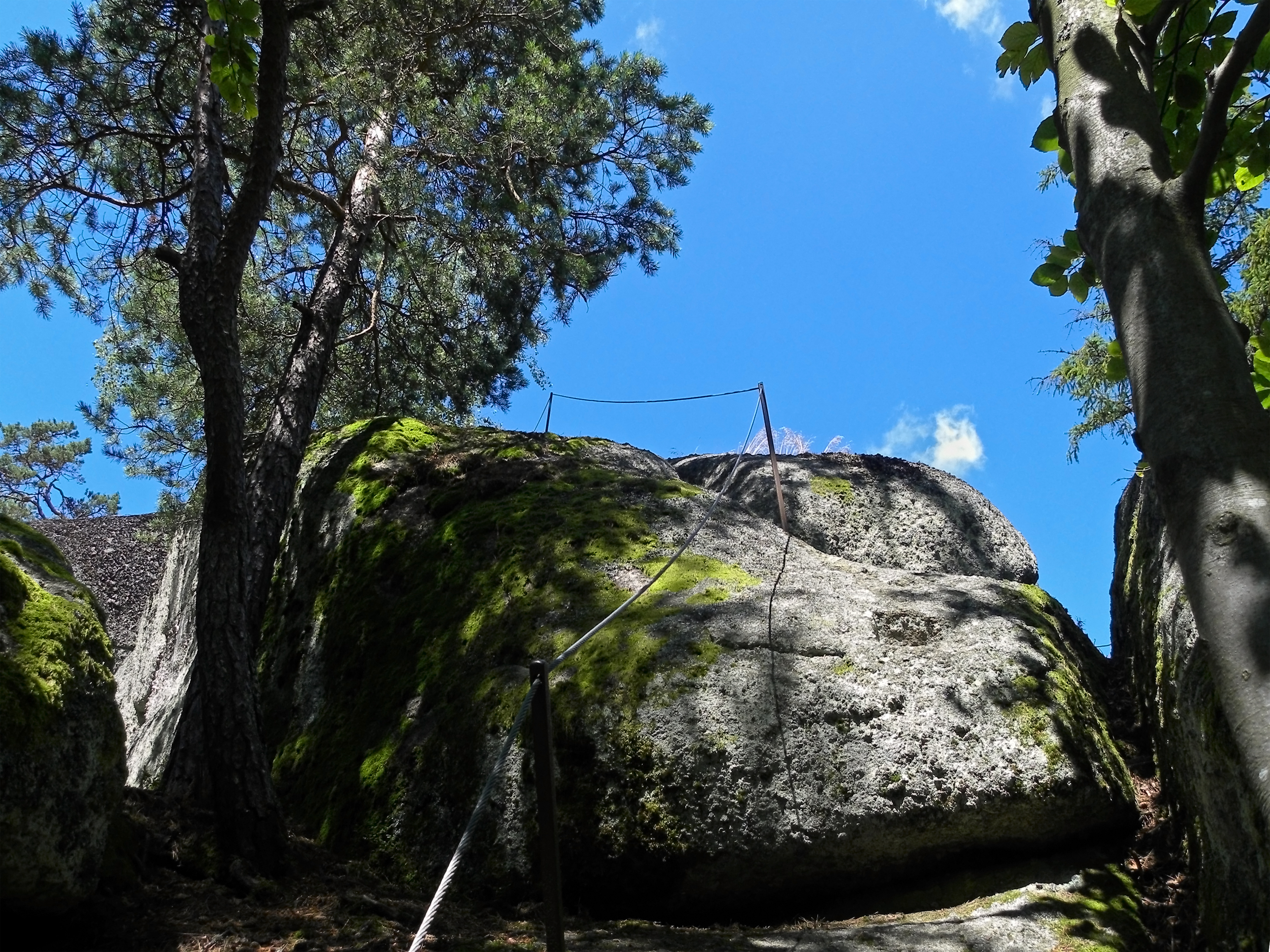 Der Herzogreitherberg ist ein Berg in der Gemeinde Sankt Leonhard bei Freistadt, dessen besondere Attraktion der Herzogreitherfelsen ist.